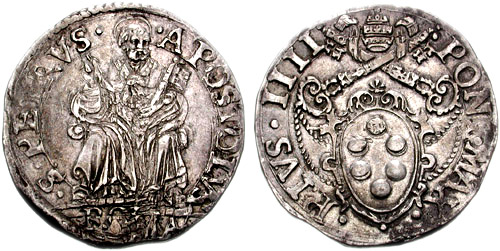 Italia, Stato Pontificio. Pio IV, Medici. 1559-1565. AR Testone (30mm, 9.17 g, 11h). PIVS IIII PONT MAX, Stemma dei Medici surmontato dalla tiara e dalle chiavi decussate S PETRVS APOSTOLVS ROMA, San Pietro (nimbato) in trono, con le chiavi; segno di zecca sotto. Italy, Papal States. Pius IV, Medici. 1559-1565. AR Testone (30mm, 9.17 g, 11h). PIVS IIII PONT MAX, Medici arms surmounted by tiara and crossed keys S PETRVS APOSTOLVS ROMA, St. Peter (haloed) enthroned, holding keys; mintmark below. Cf. CNI XV pg. 488, 8; Muntoni II pg.6, 7; Berman 1063. see: Italian modern coins